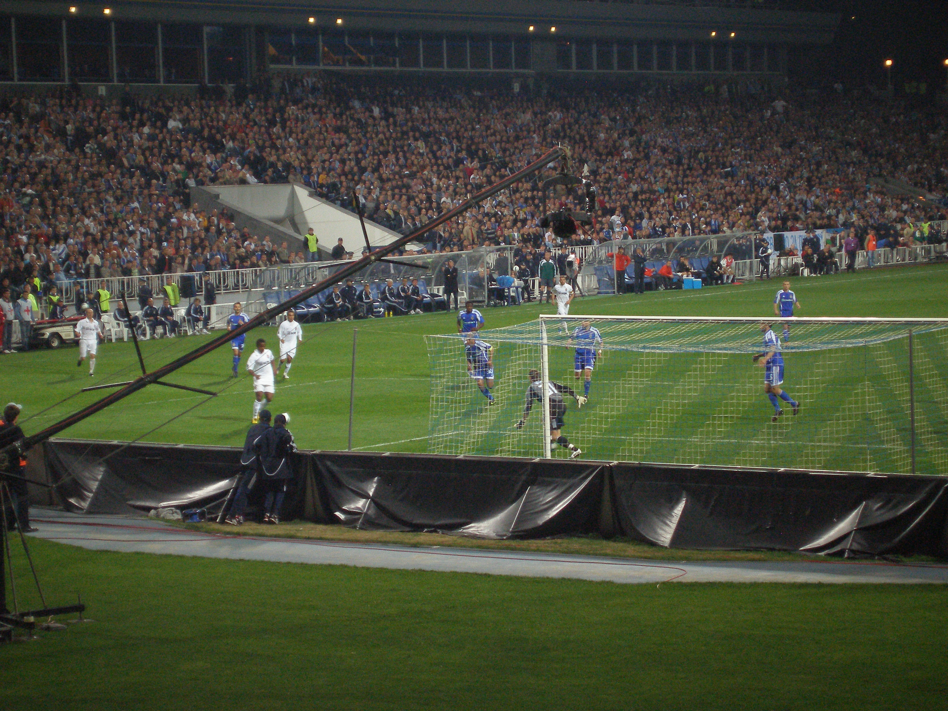 Гольова атака «Шахтаря»